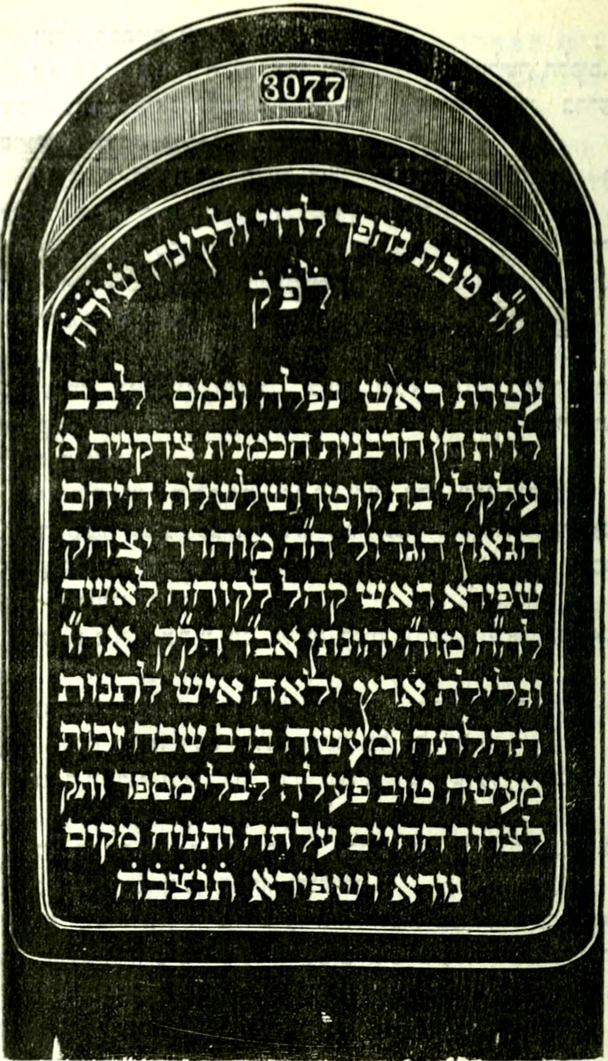 מצבת אשת הרה"ג וכו' מוהר"ר יהונתן אייבשיטץ זצ"ל.